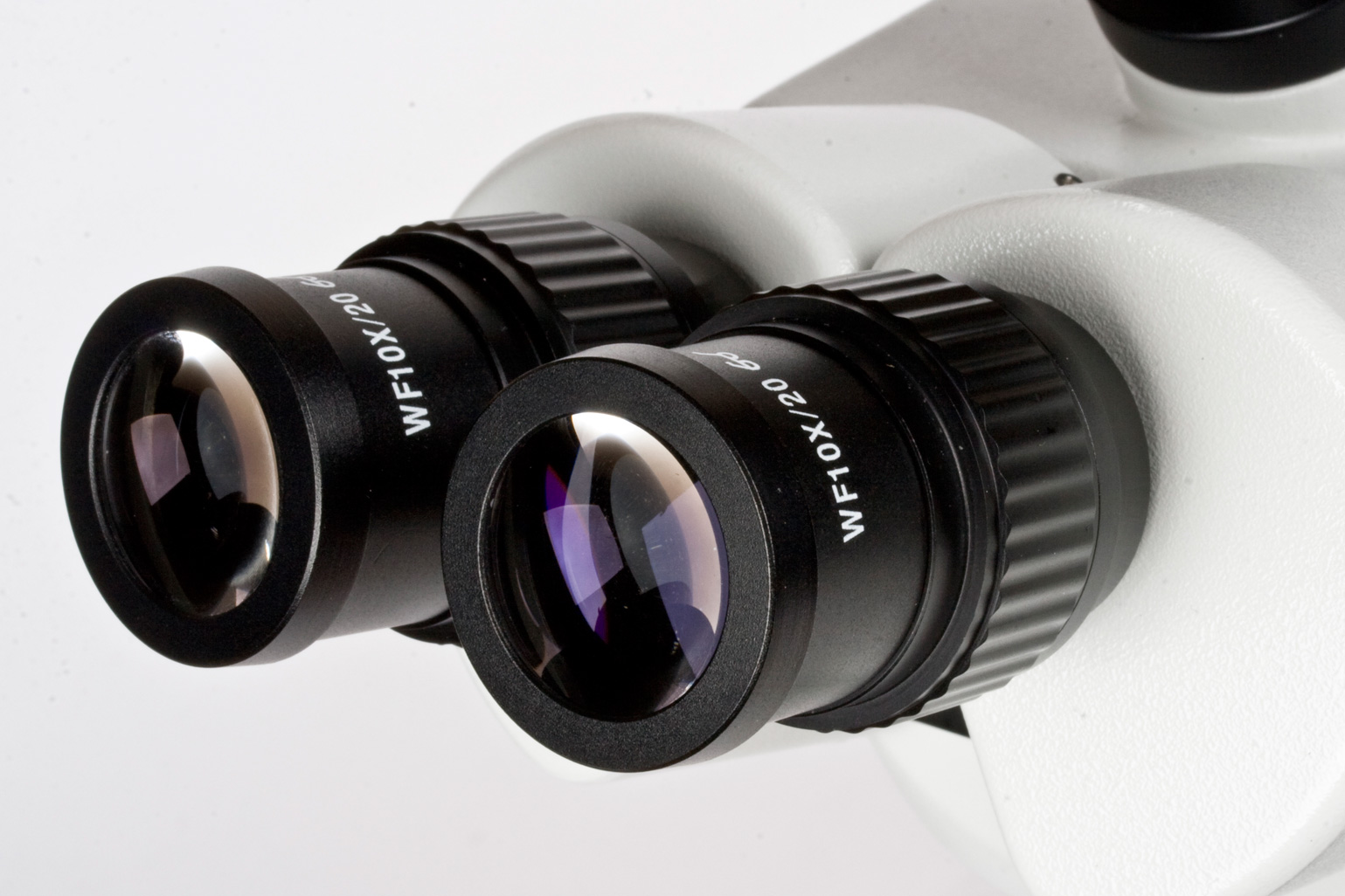 Окуляры микроскопа Альтами ПС II (новое название - Альтами ПС0745 [1])